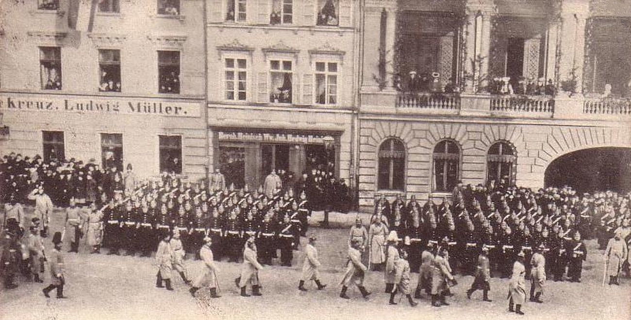 Parada 2. Górnośląskiego, 57. Pułku Artylerii Polowej na prudnickim rynku. W tle widoczna nieistniejąca już dziś zabudowa. Po prawej fragment Urzędu Miejskiego.